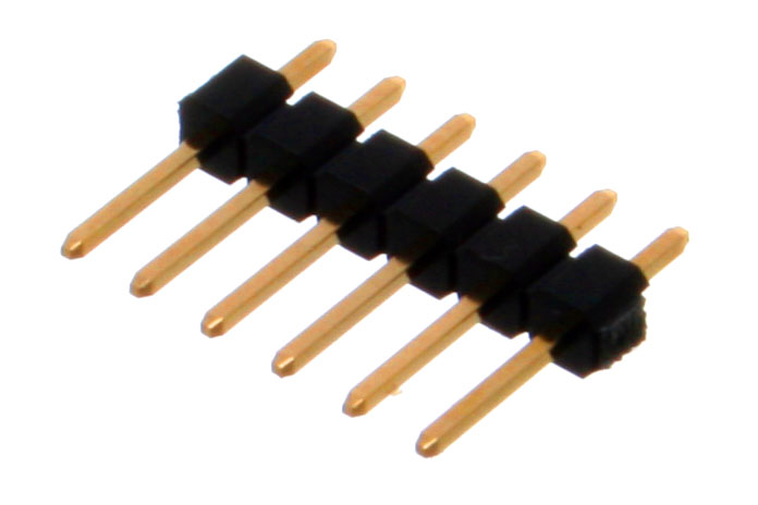 6 Pin Header.